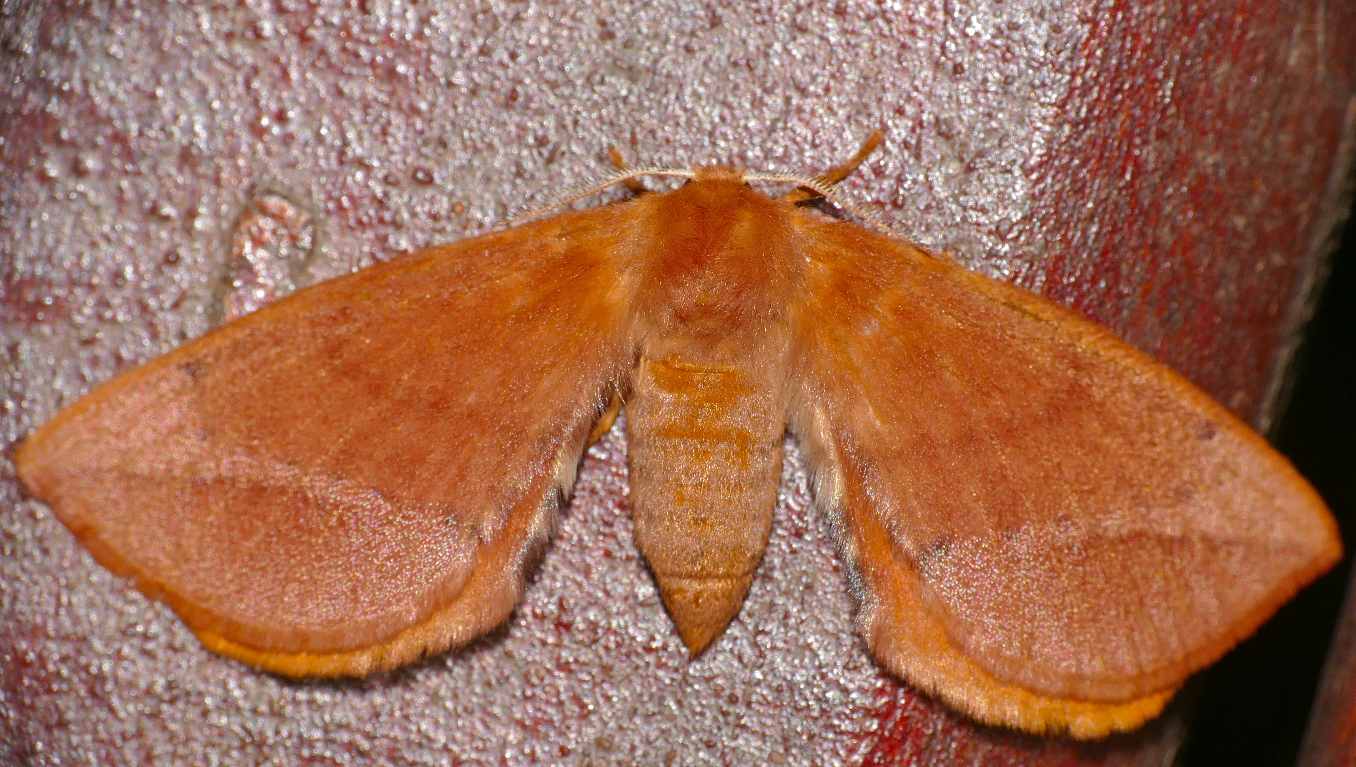 Makhutsi Camp, Lekgalameetse Provincial Park, Limpopo, SOUTH AFRICA